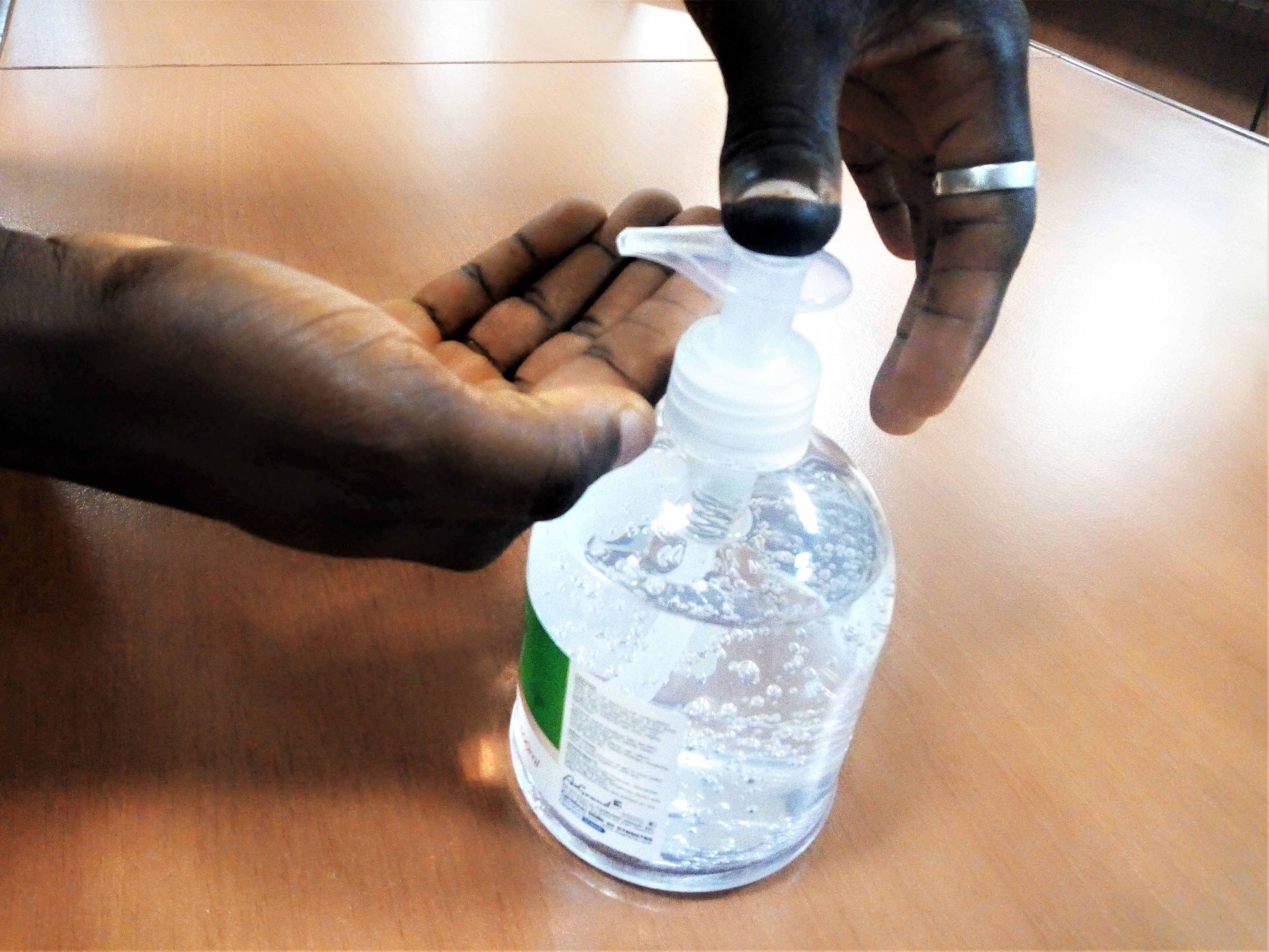 COVID-19 au Bénin_flacons de gel hydroalcoolique en usage